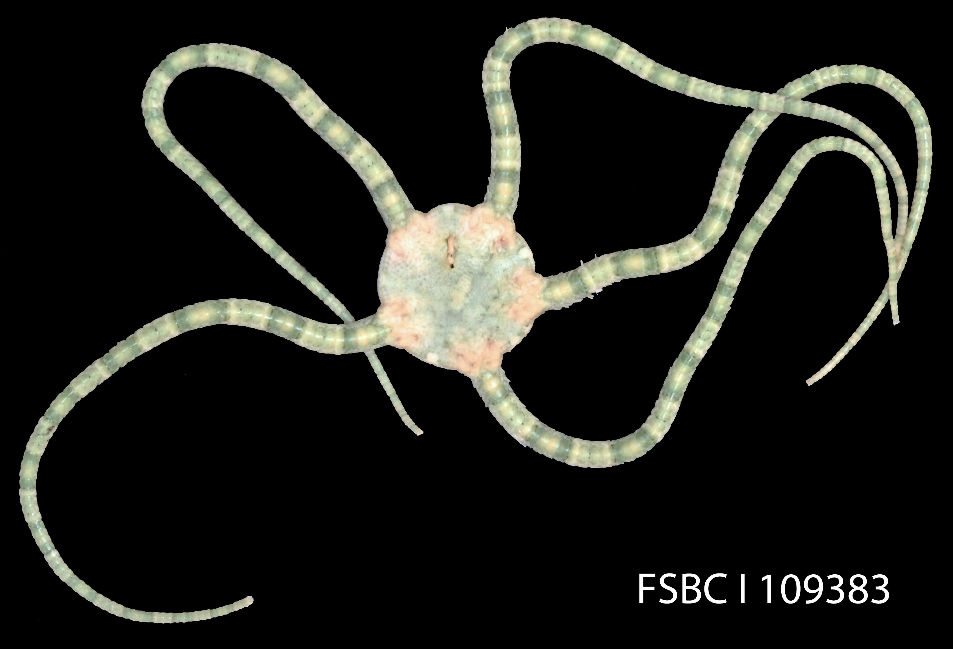 Scientific name: Ophioderma brevispina